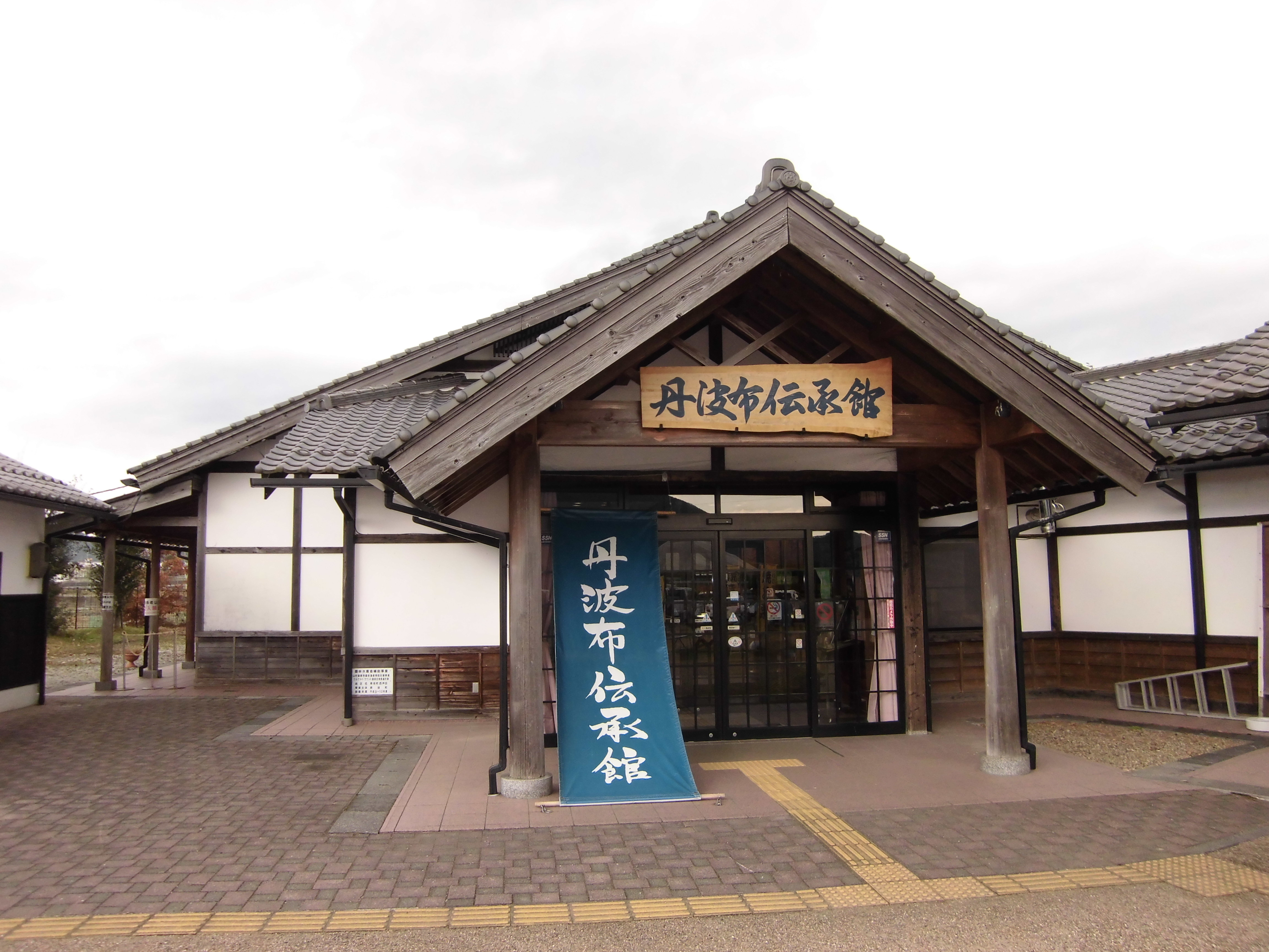 丹波布の技術を伝えるために展示・体験・ビデオコーナーが設けられている。